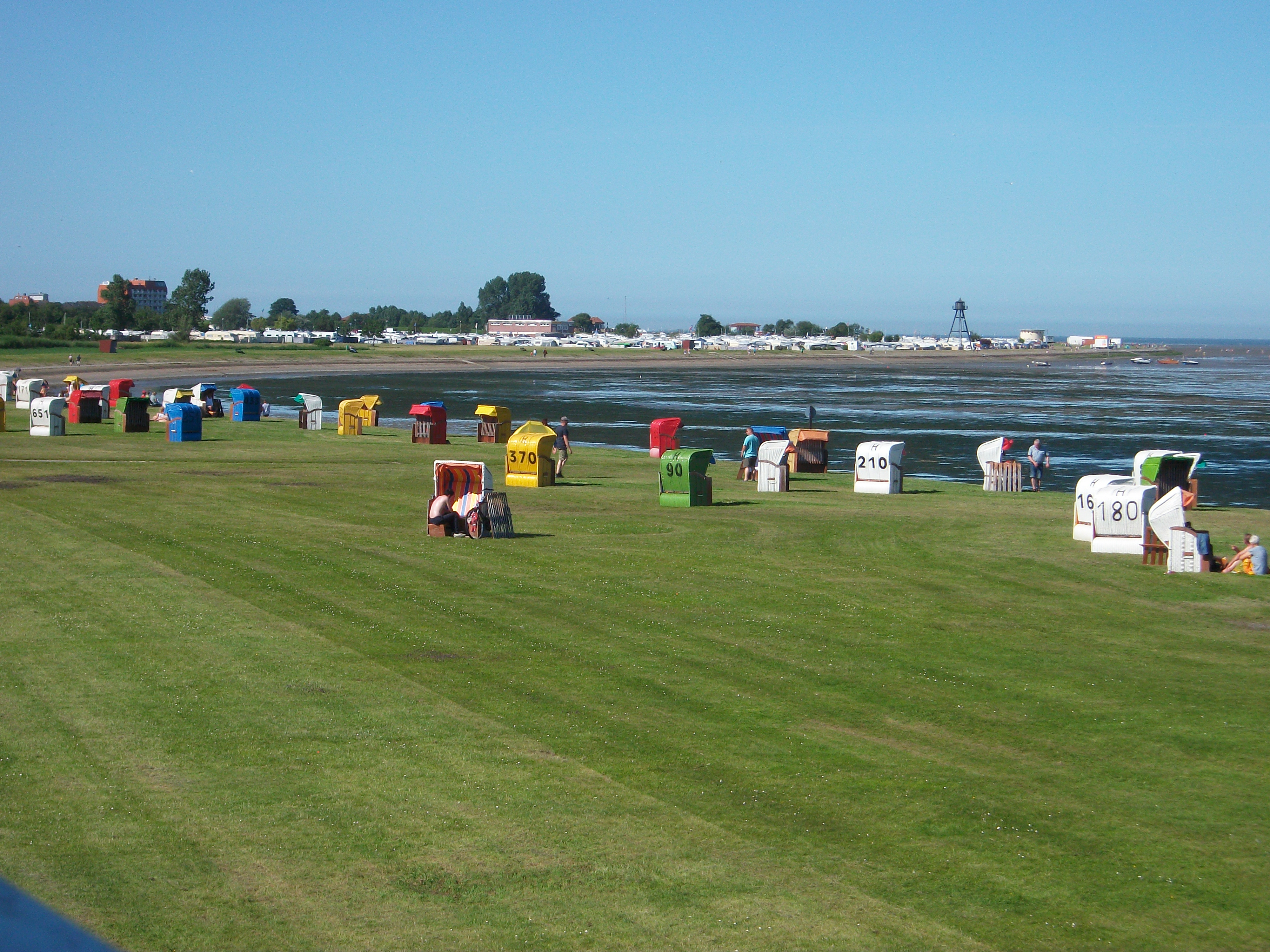 Plaža u Horumersielu